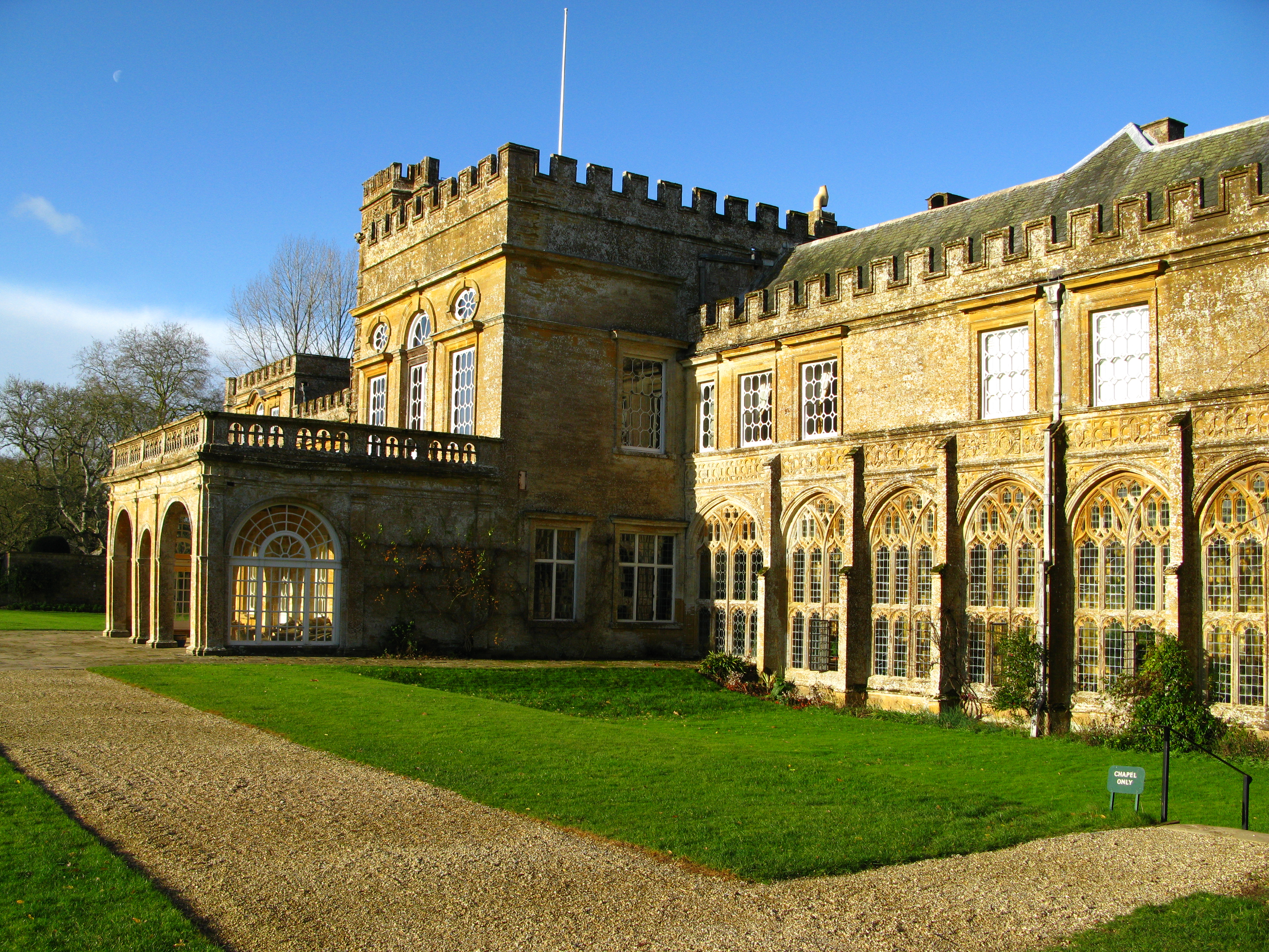 Forde Abbey